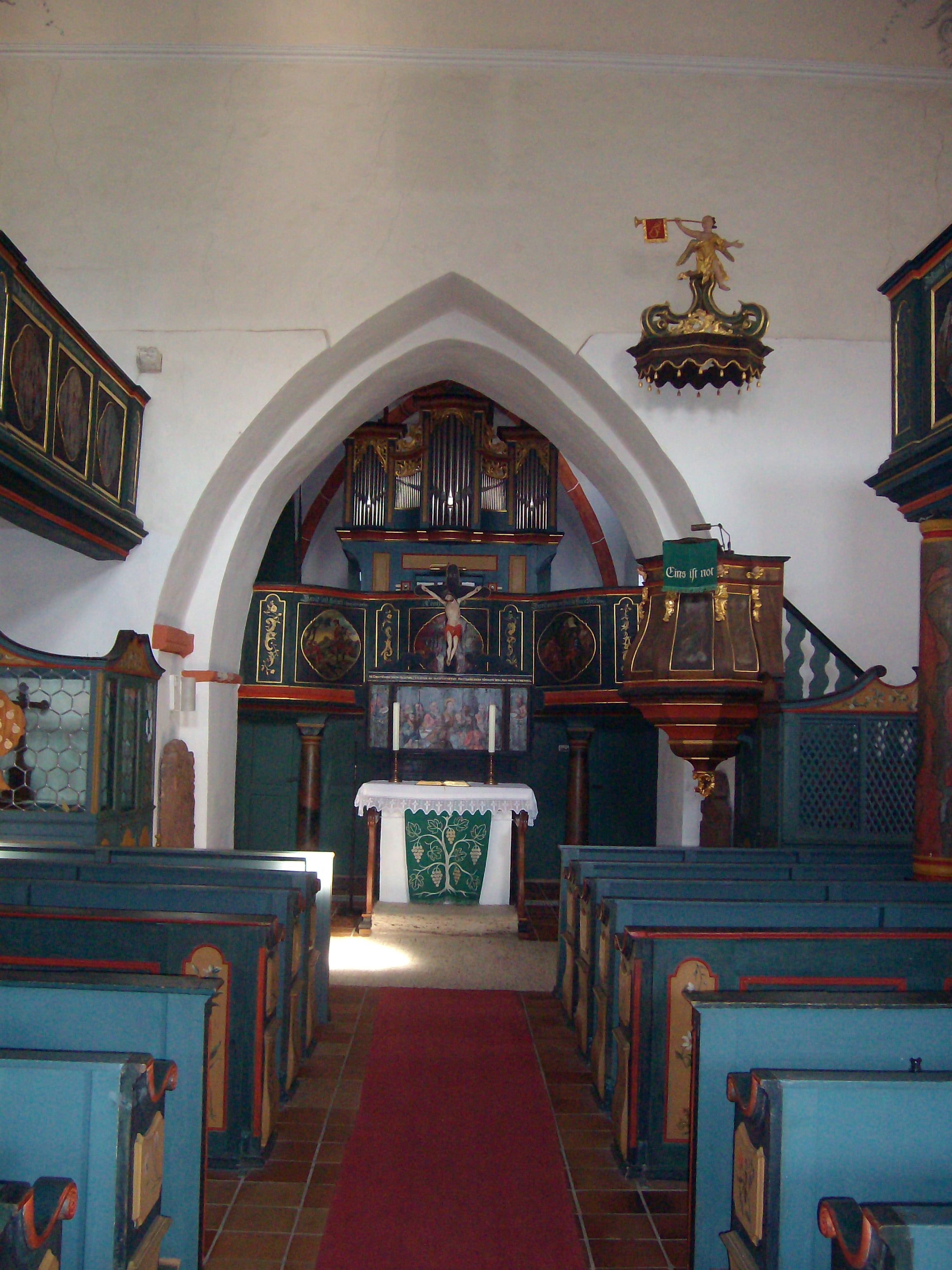 Innenraum der Evangelischen Kirche Freienseen, Laubach, Landkreis Gießen, Hessen, Deutschland